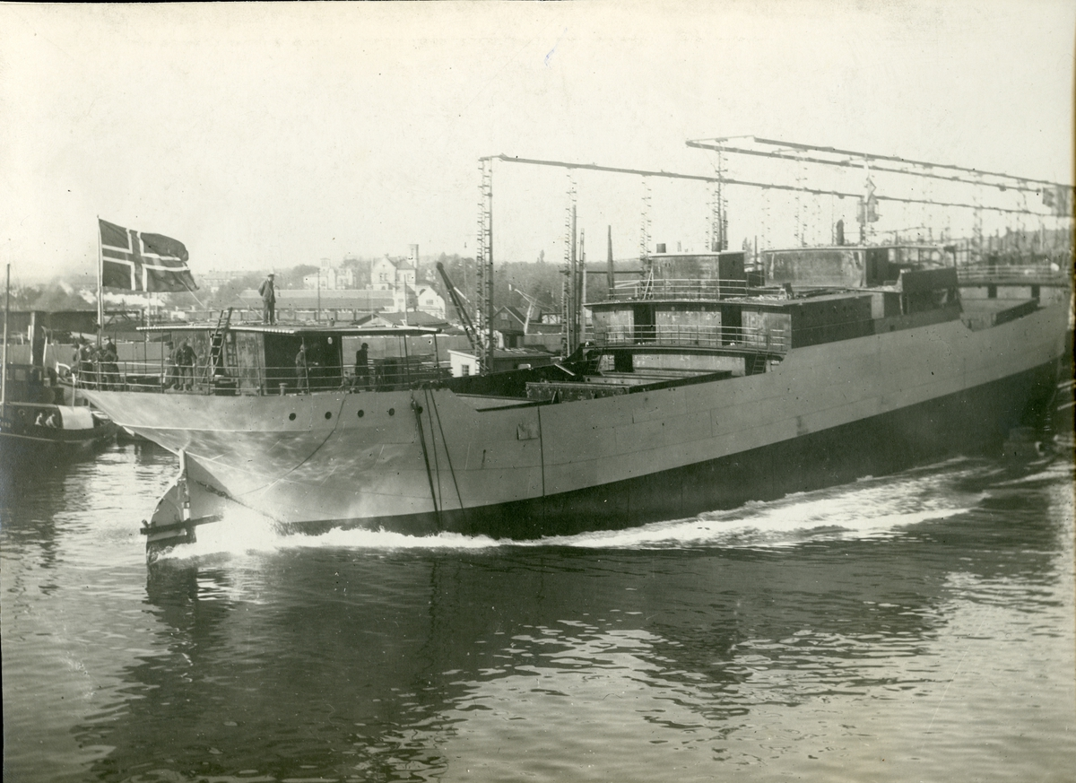 Stabelavløpning, lastebåten D/S Borgholm (senere D/S Holger), B/N 396. Levert av Akers Mek. Verksted i 1921 til Disp. J. G. F. Lund, Bergen.